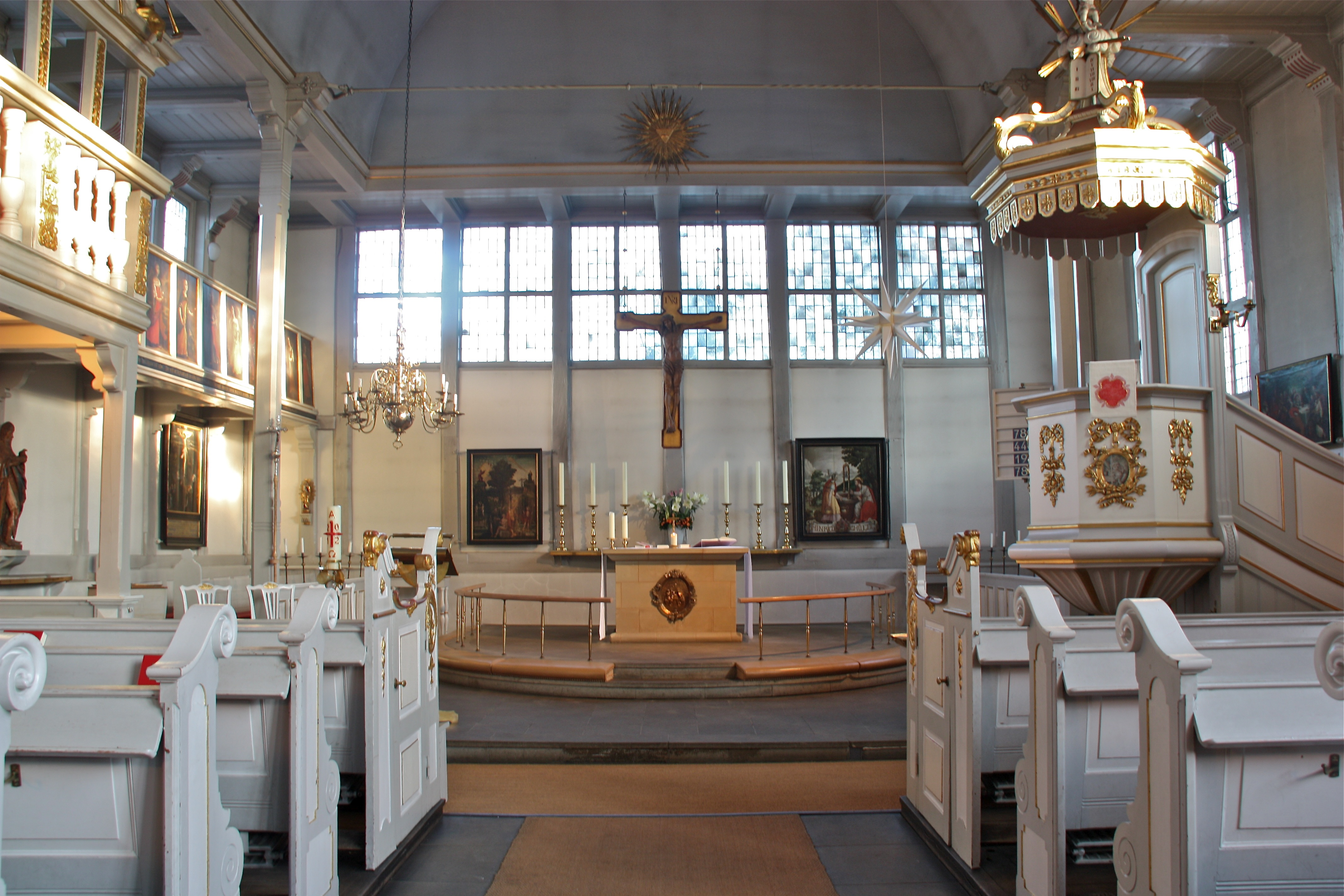 Hamburg, Eppendorf, Kirche St. Johannis, Innenraum, Blick zum Altar